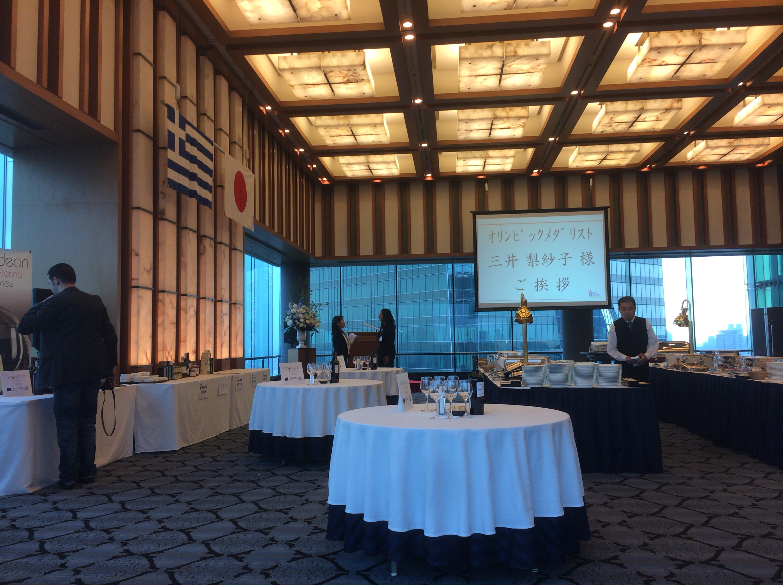 日本ギリシャ協会の総会会場：住友会館